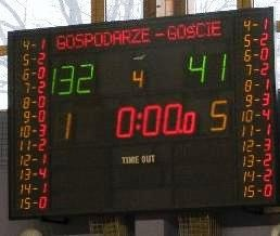 Typowa tablica wyników w koszykówce